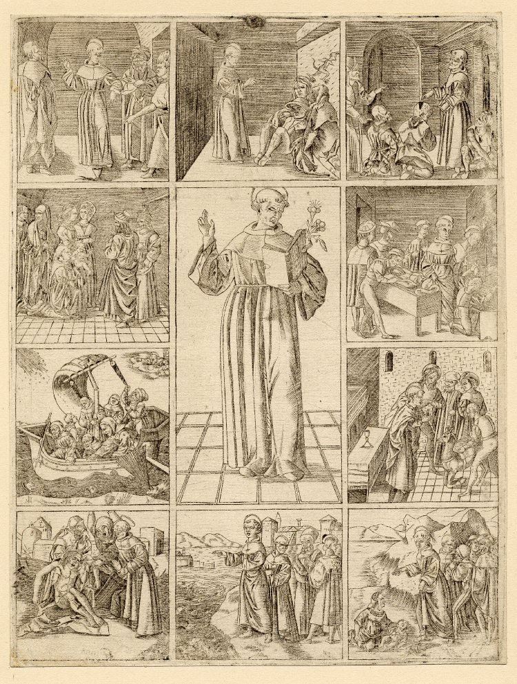 Effigie di sant'Antonio da Padova circondata da dieci riquadri con le storie di alcuni miracoli del santo.